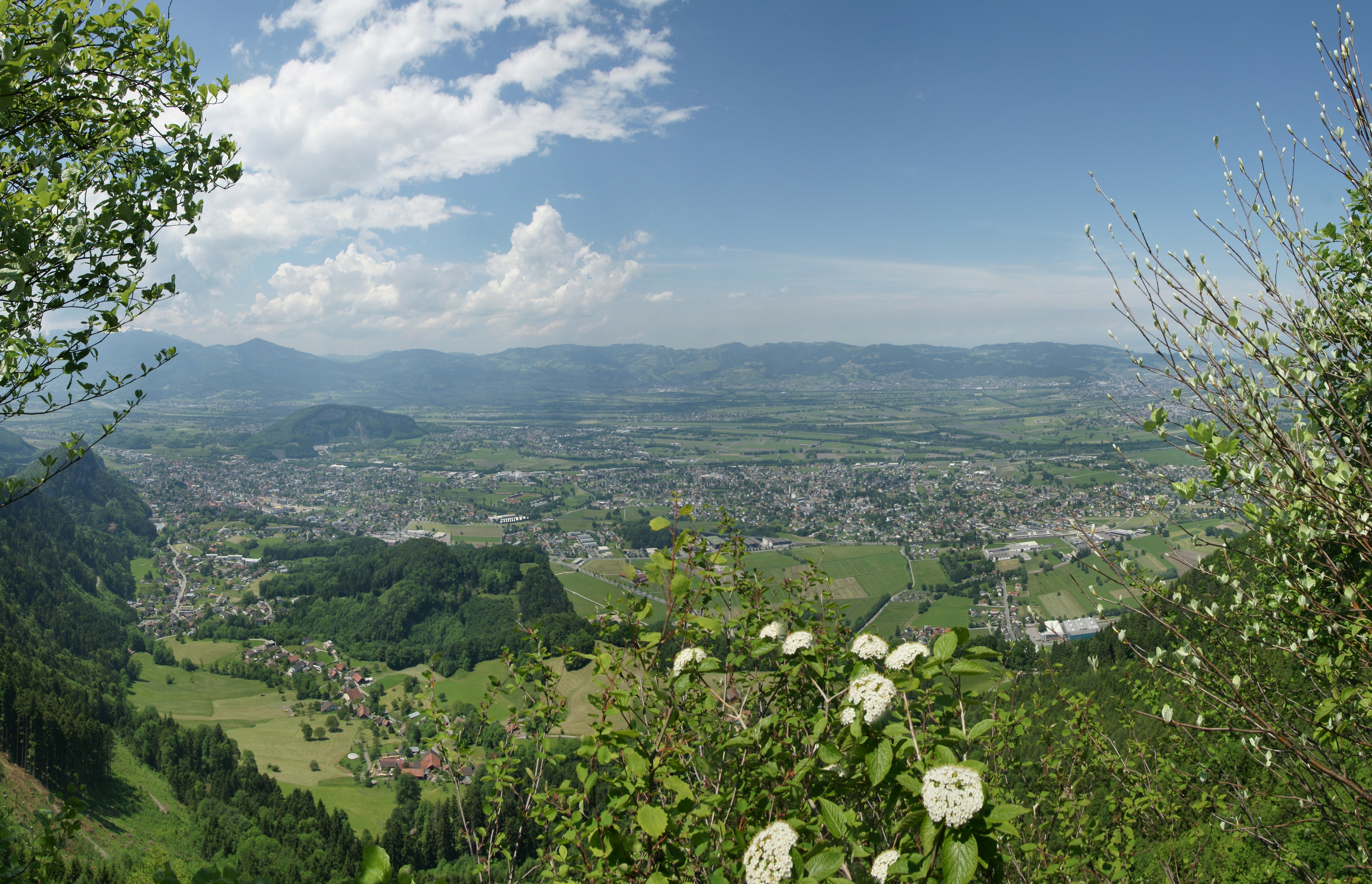 Aussichtpunkt auf dem Kapf von Götzis. Der Blick richtet sich ins Rheintal und in die benachbarte Schweiz.